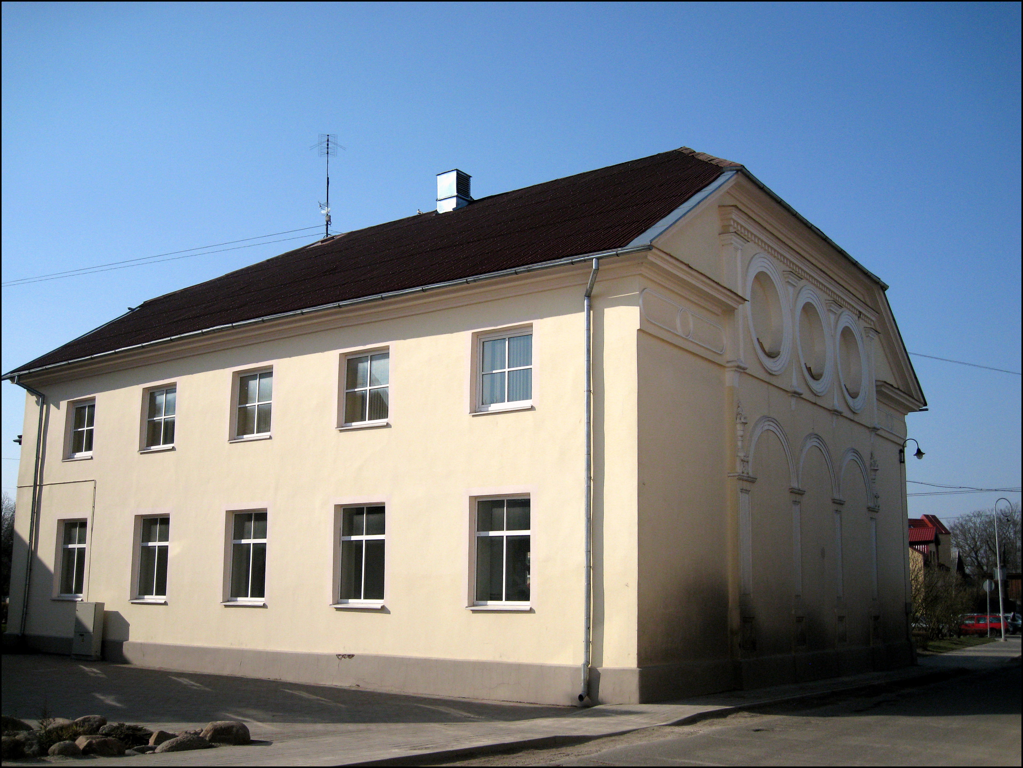 Tukums synagogue